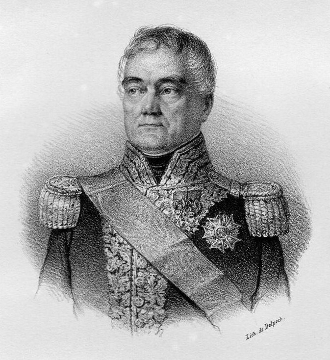 Général_Georges_Mouton